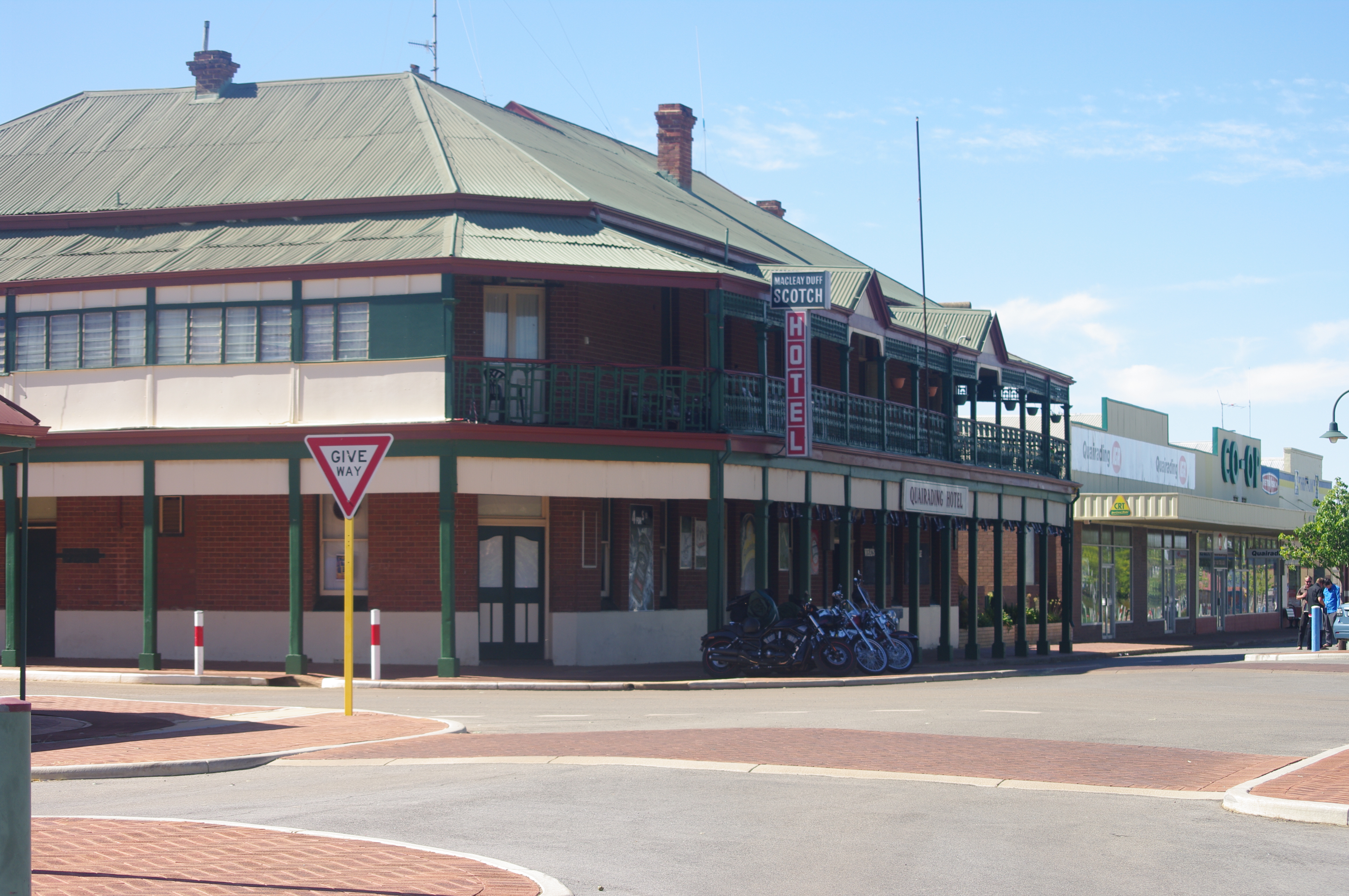 Quairading Hotel